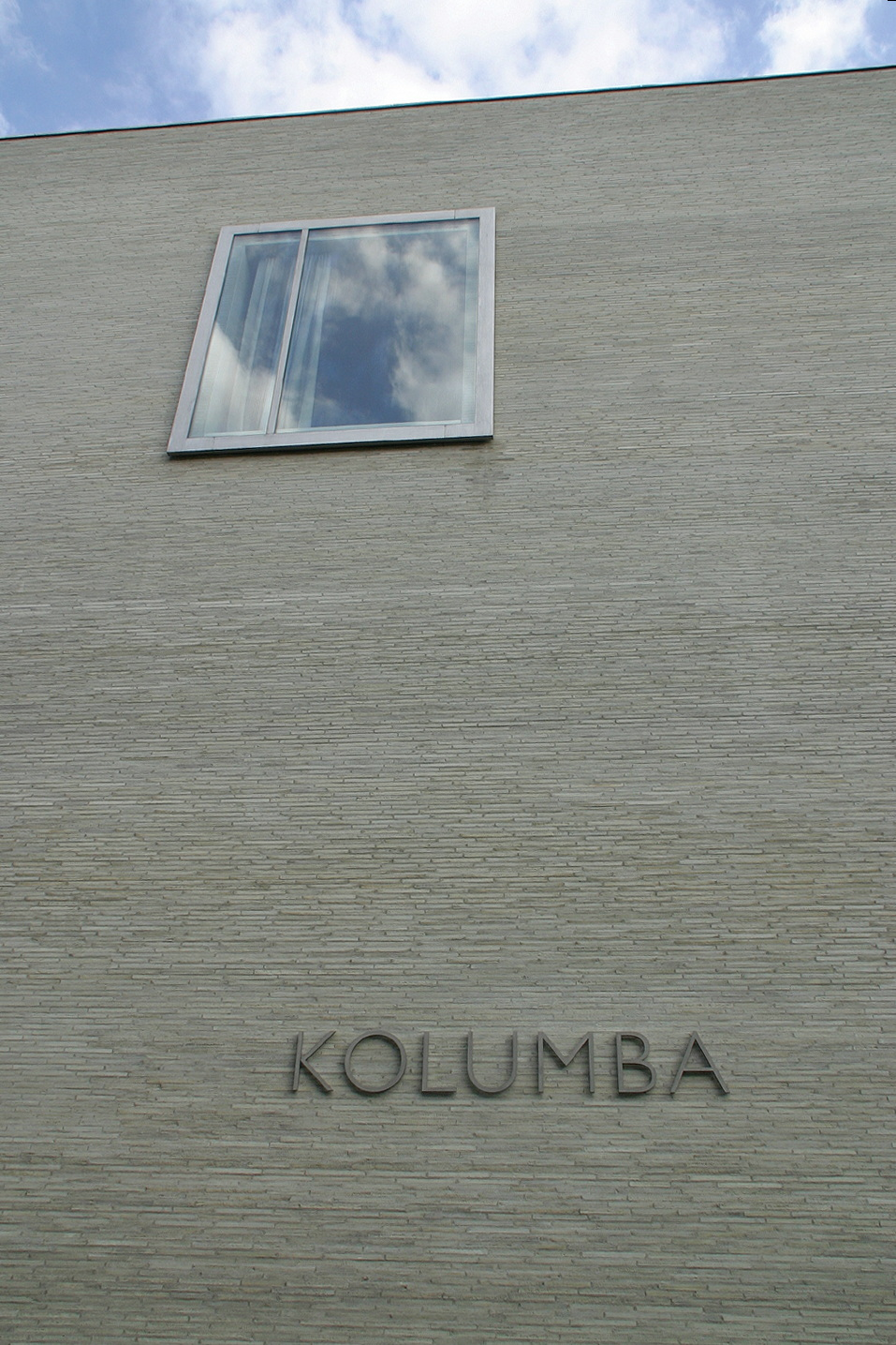 Kolumba, Erzbischöfliches Diözesanmuseum, Seitenansicht